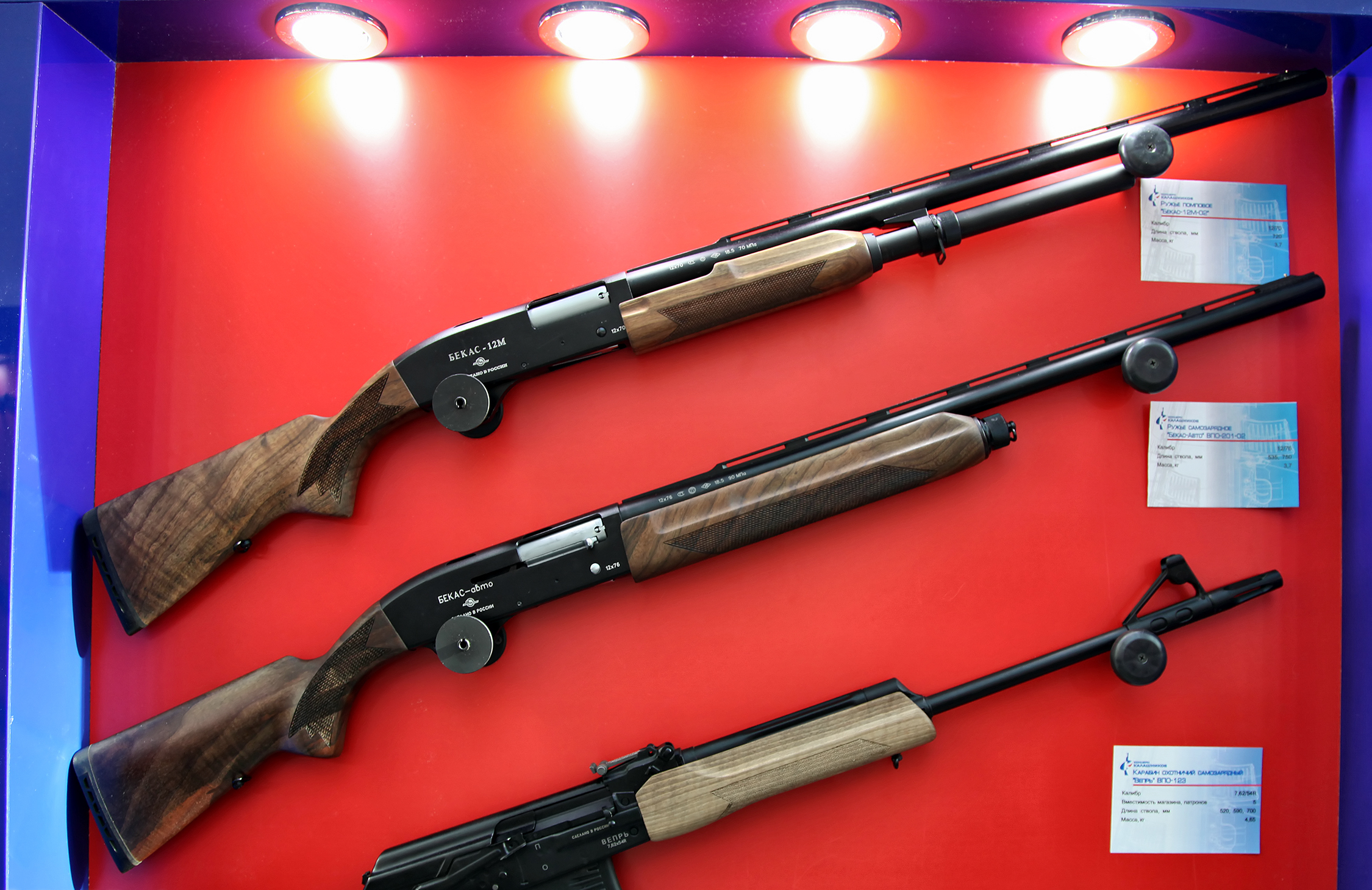 12x70 ружье Бекас-12М-02 и 12x76 ружье Бекас-Авто ВПО-201-02 (12x70 Bekas-12M-02 and 12x76 Bekas-Auto VPO-201-02)